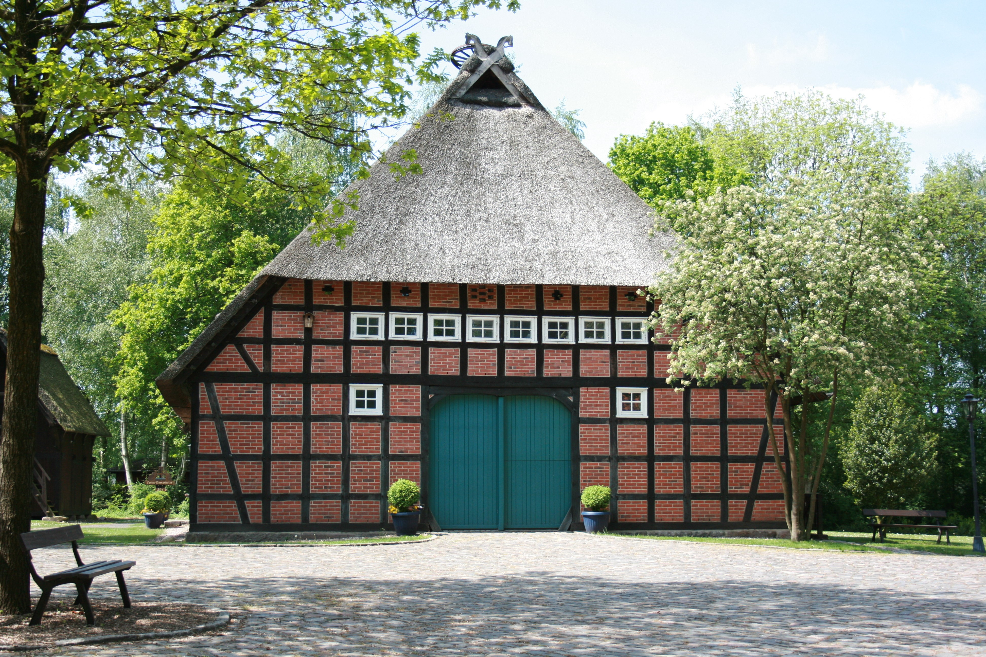 Schröers-Hof, Kirchstraße in Neuenkirchen (Lüneburger Heide)